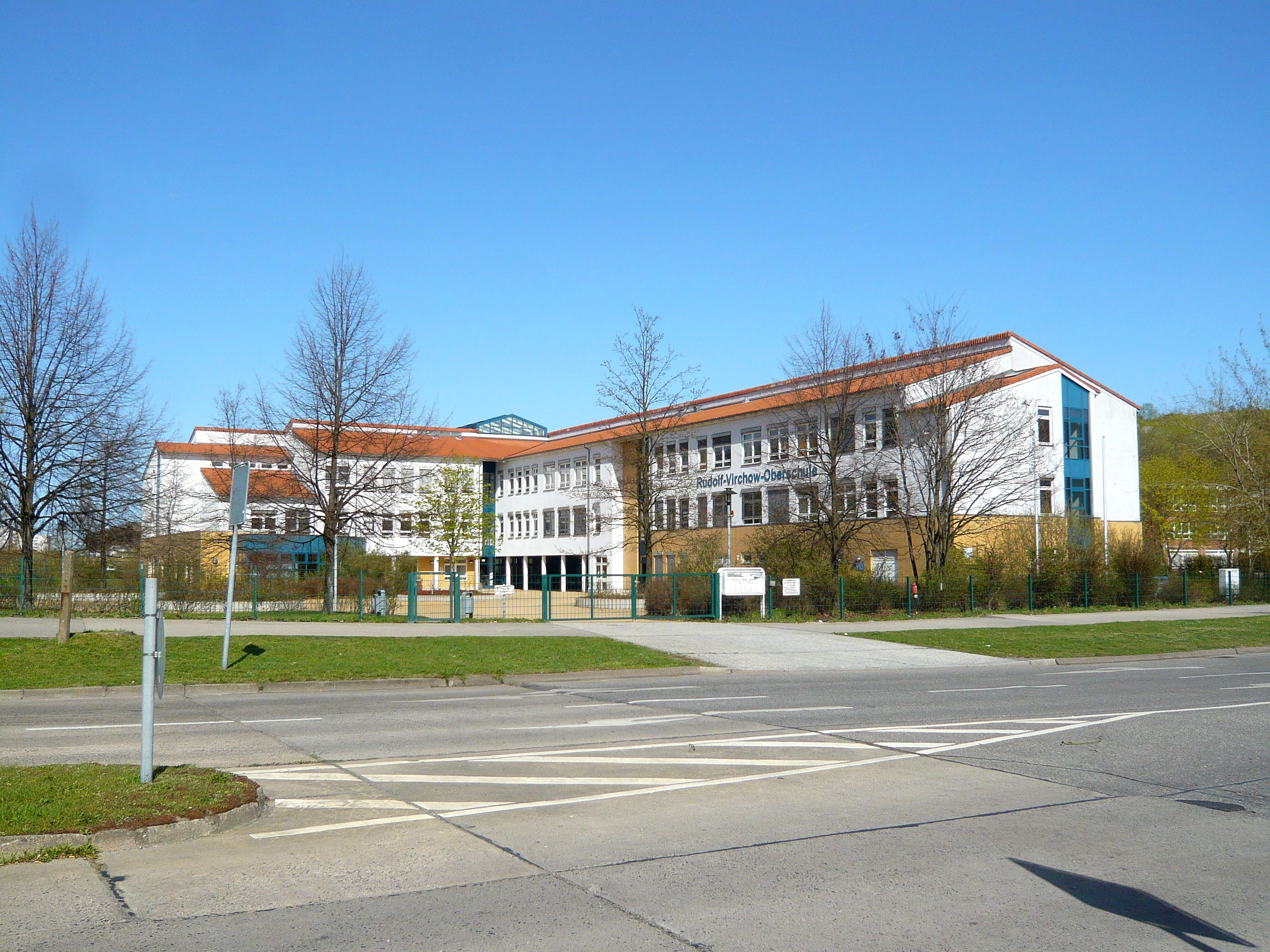 Ortsteil Marzahn: Blumberger Damm